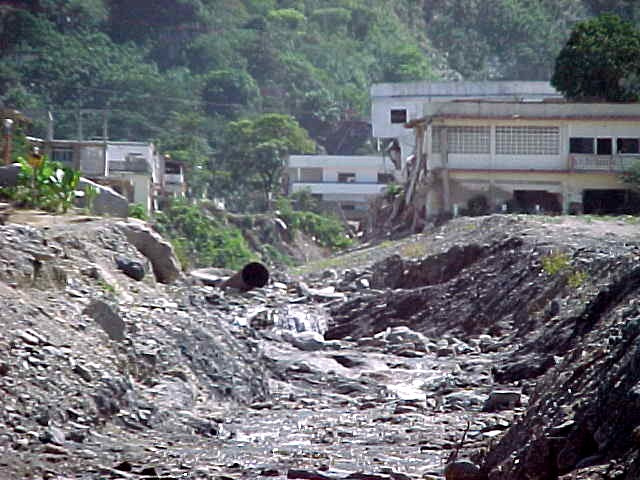 Carmen de Uria en el estado Vargas - Venezuela a un año de del deslave de diciembre de 1999 (2000)